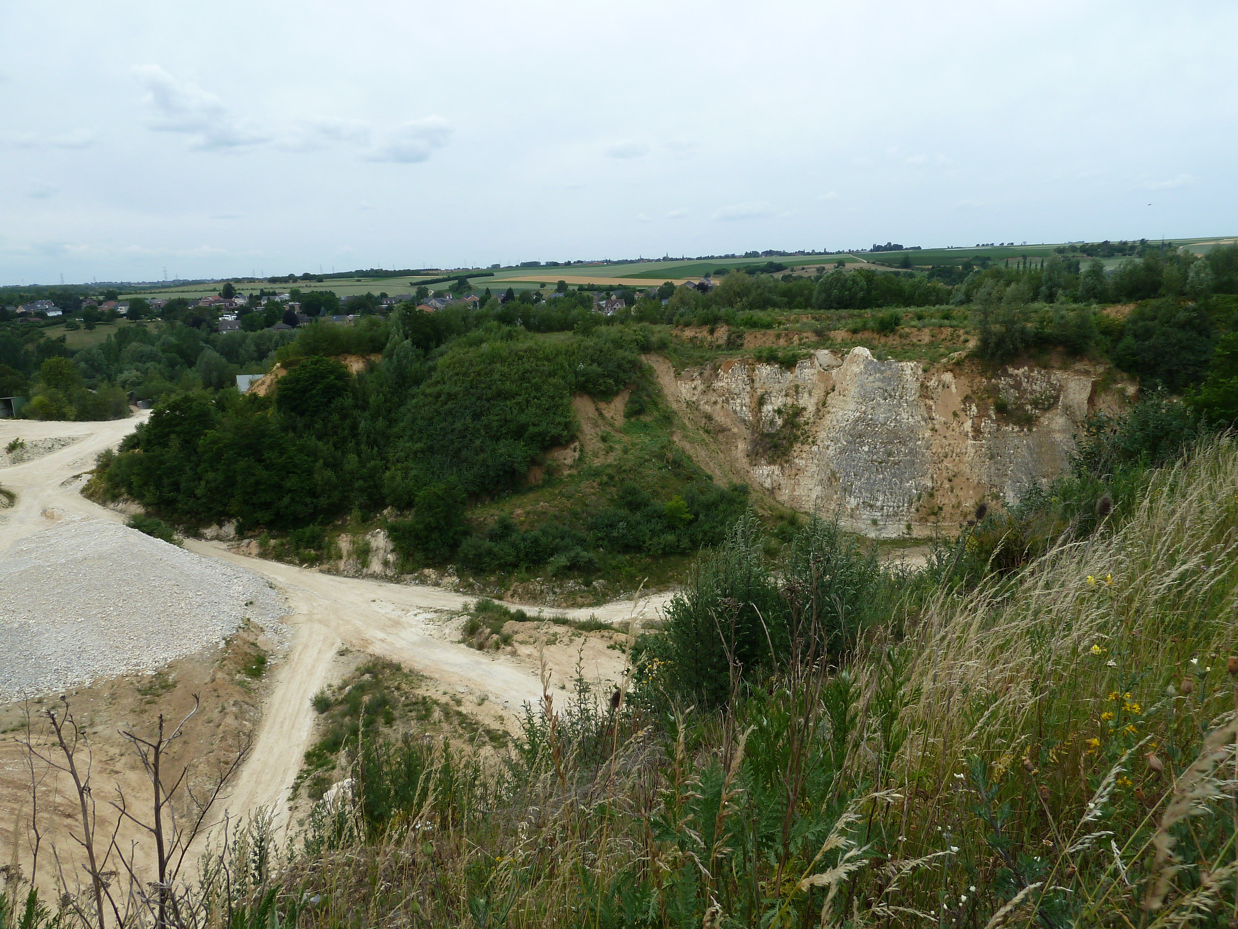 carrière Marnebel, Bassenge, Belgique